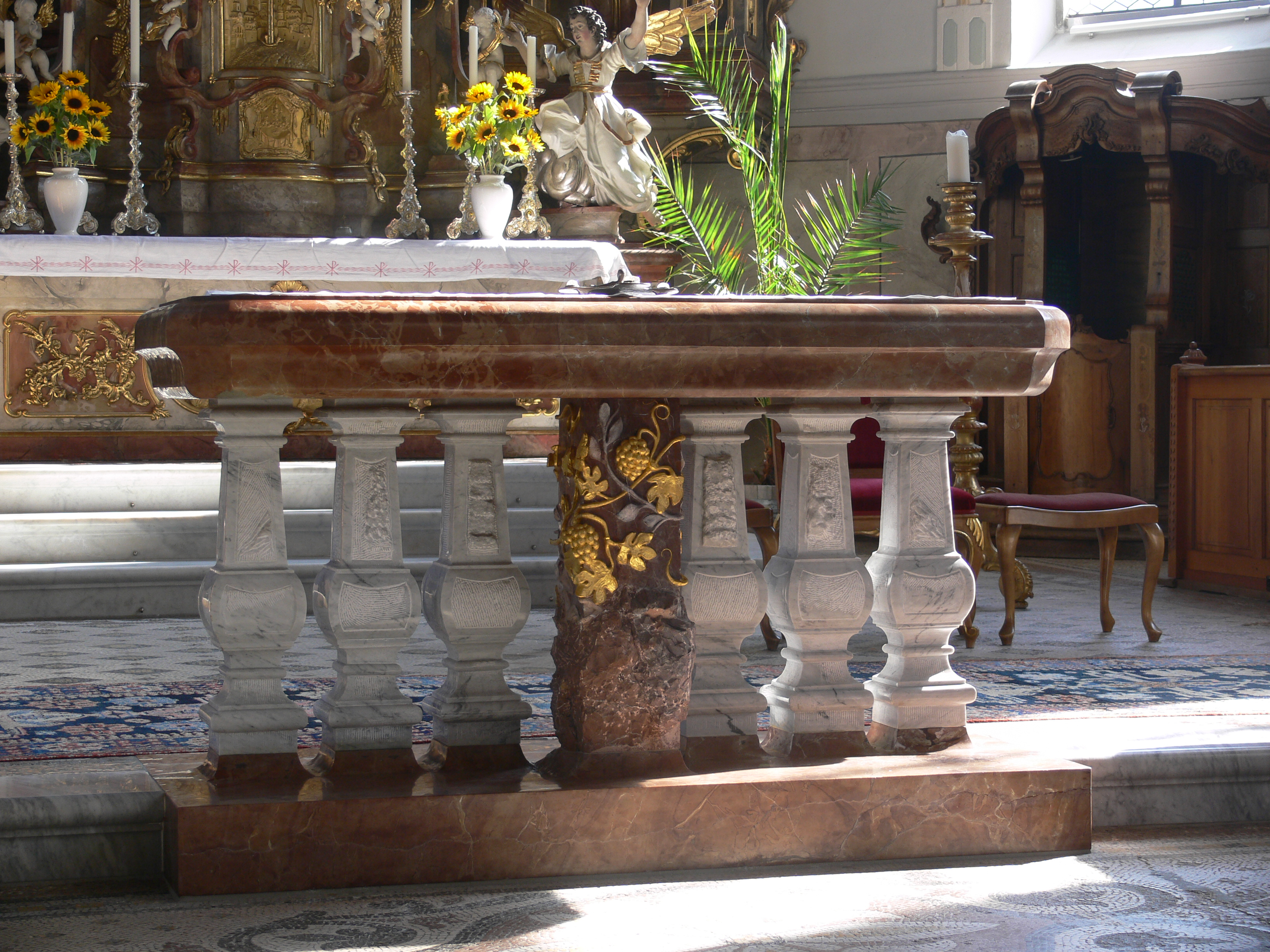 Pfarrkirche St. Gallus, Scheidegg: Volksaltar